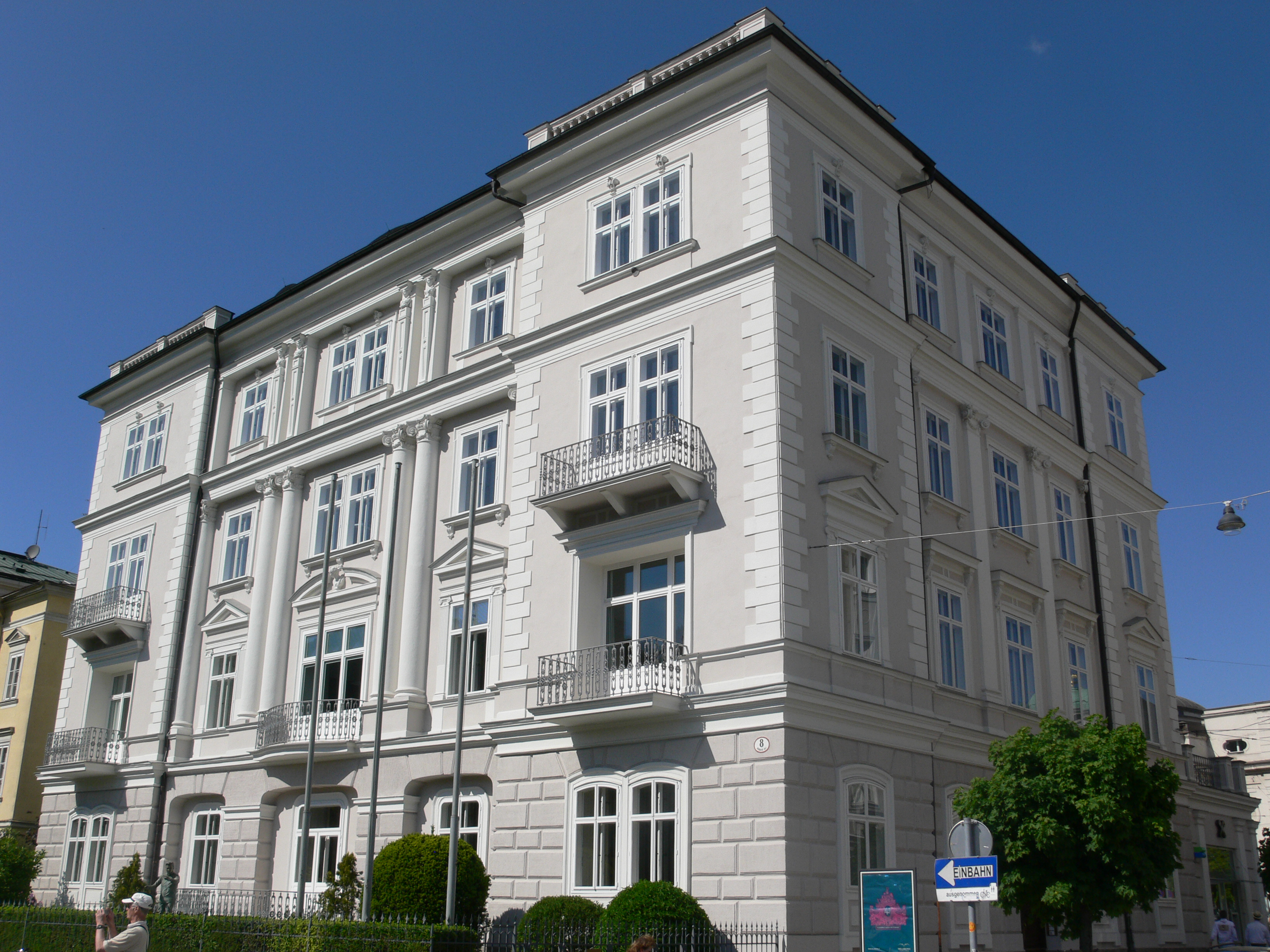 Salzburg, (vermeintliches) Geburtshaus Herbert von Karajans, J.-F.-Hummel-Str. 1 (beim Makartsteg)